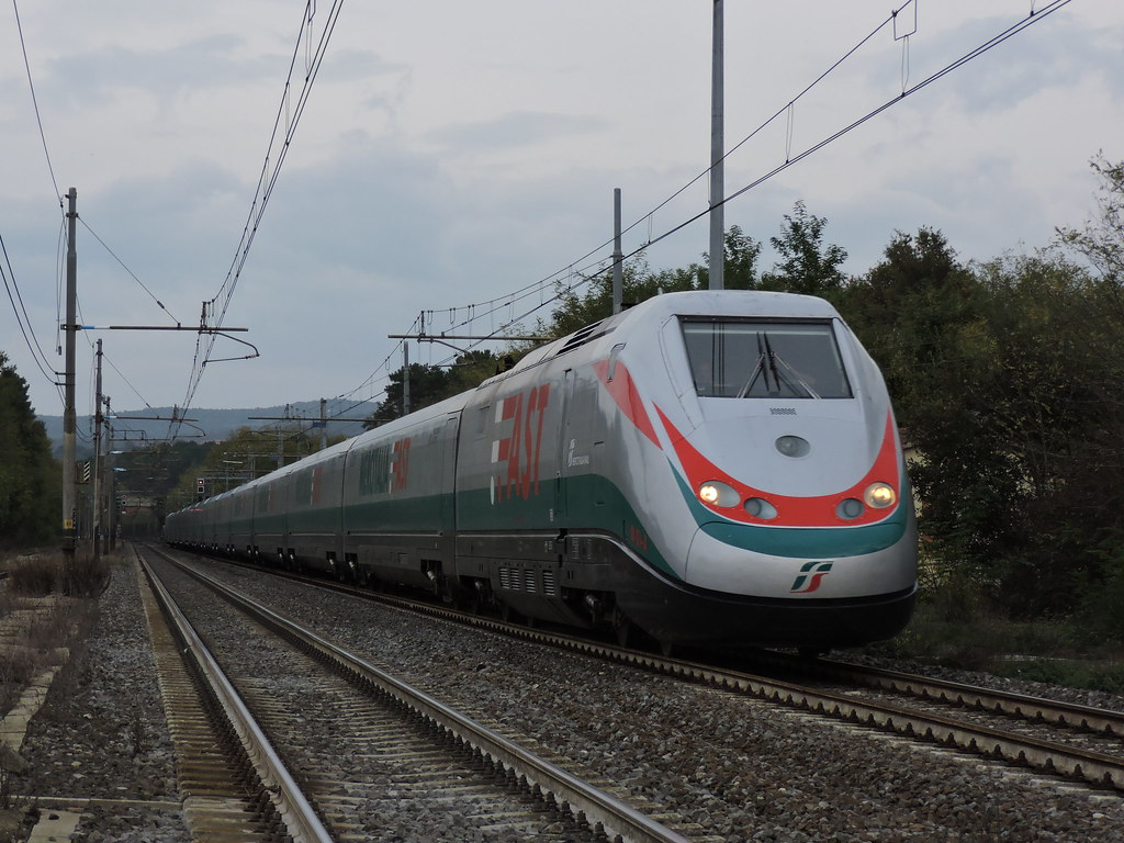 Il treno di Mercitalia fast in viaggio